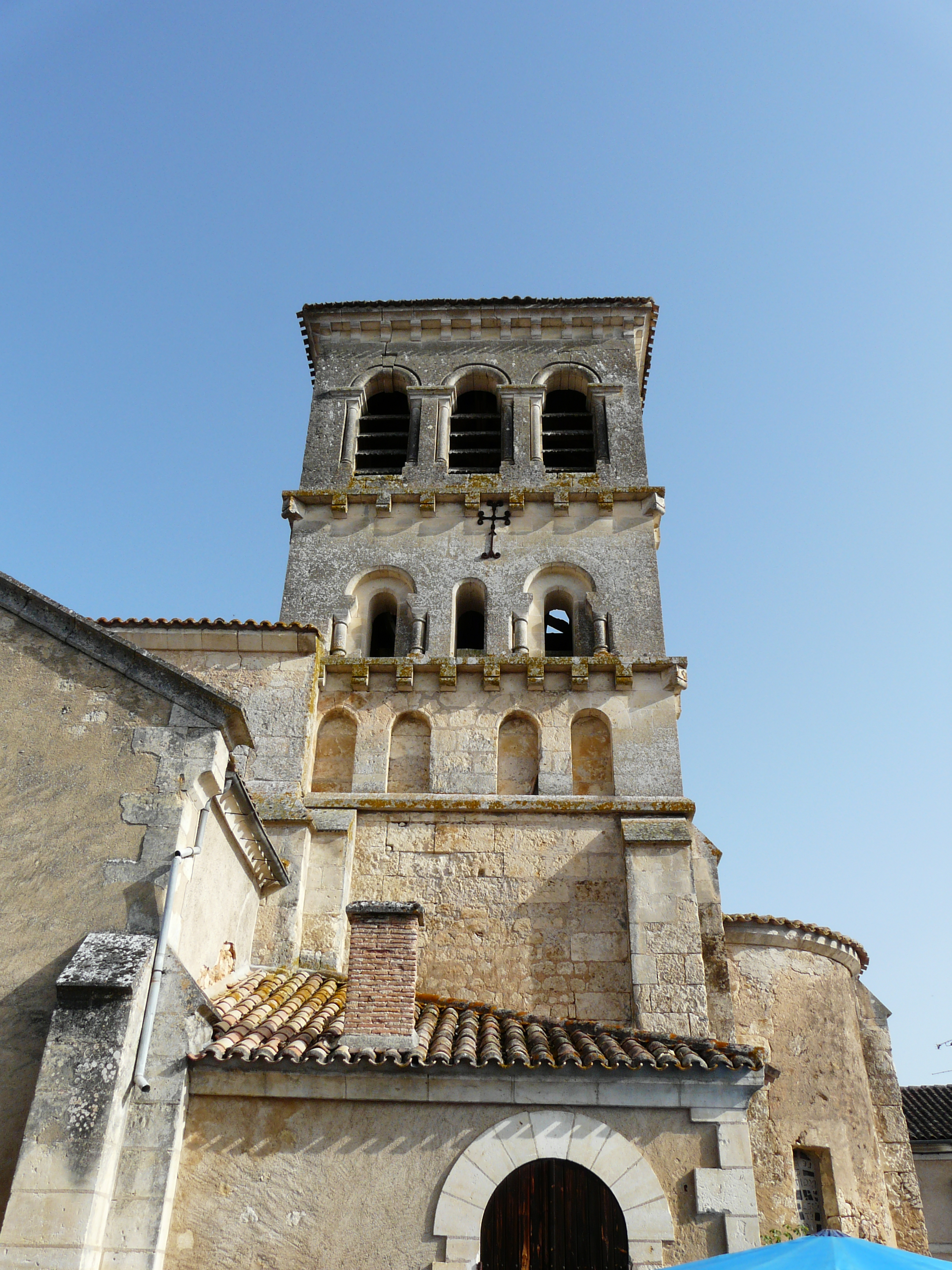 Le clocher de l'église Notre-Dame-de-la-Nativité, Beauronne, Dordogne, France.